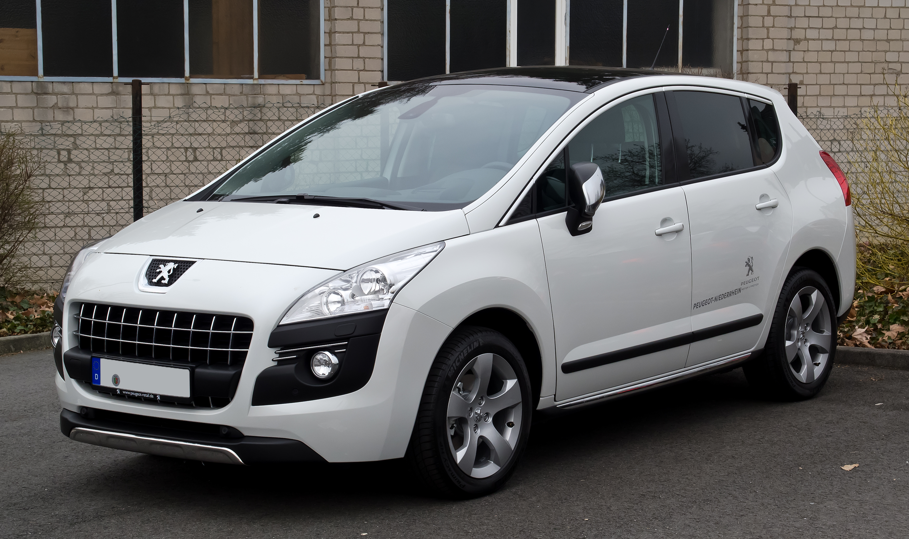 Peugeot 3008 HDi FAP 110 Allure